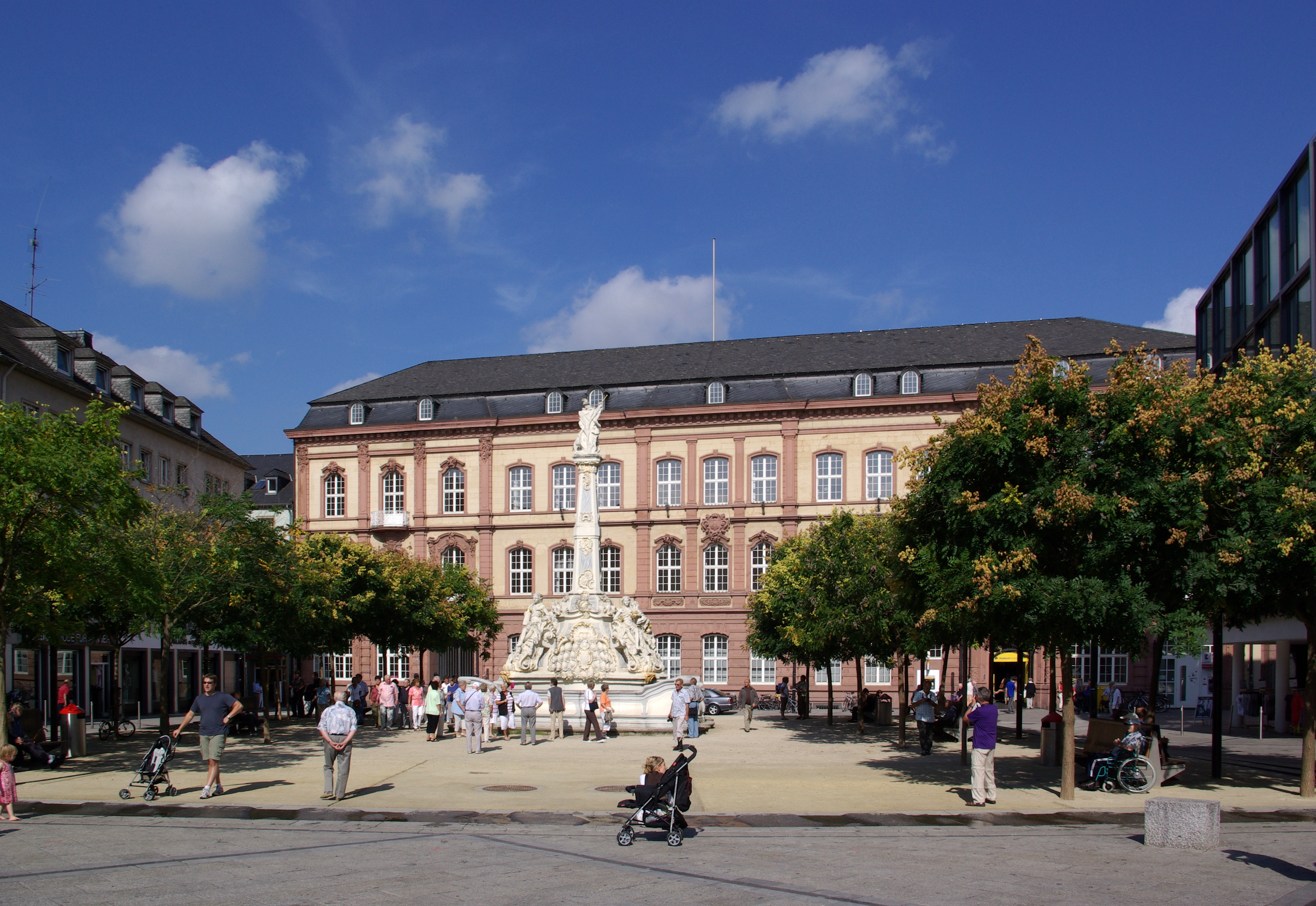 Trier, Kornmarkt, Ehemaliges Post- und Telegraphengebäude der Kaiserlichen Oberpostdirektion, schlossartige dreigeschossige Dreiflügelanlage, Mansardwalmdach, gebaut 1879-82, Architekt Regierungsbaumeister Hausmann; Georgsbrunnen, Rokokobrunnen mit Darstellung der vier Jahreszeiten und dem Heiligen Georg als Drachentöter auf einem Obelisk